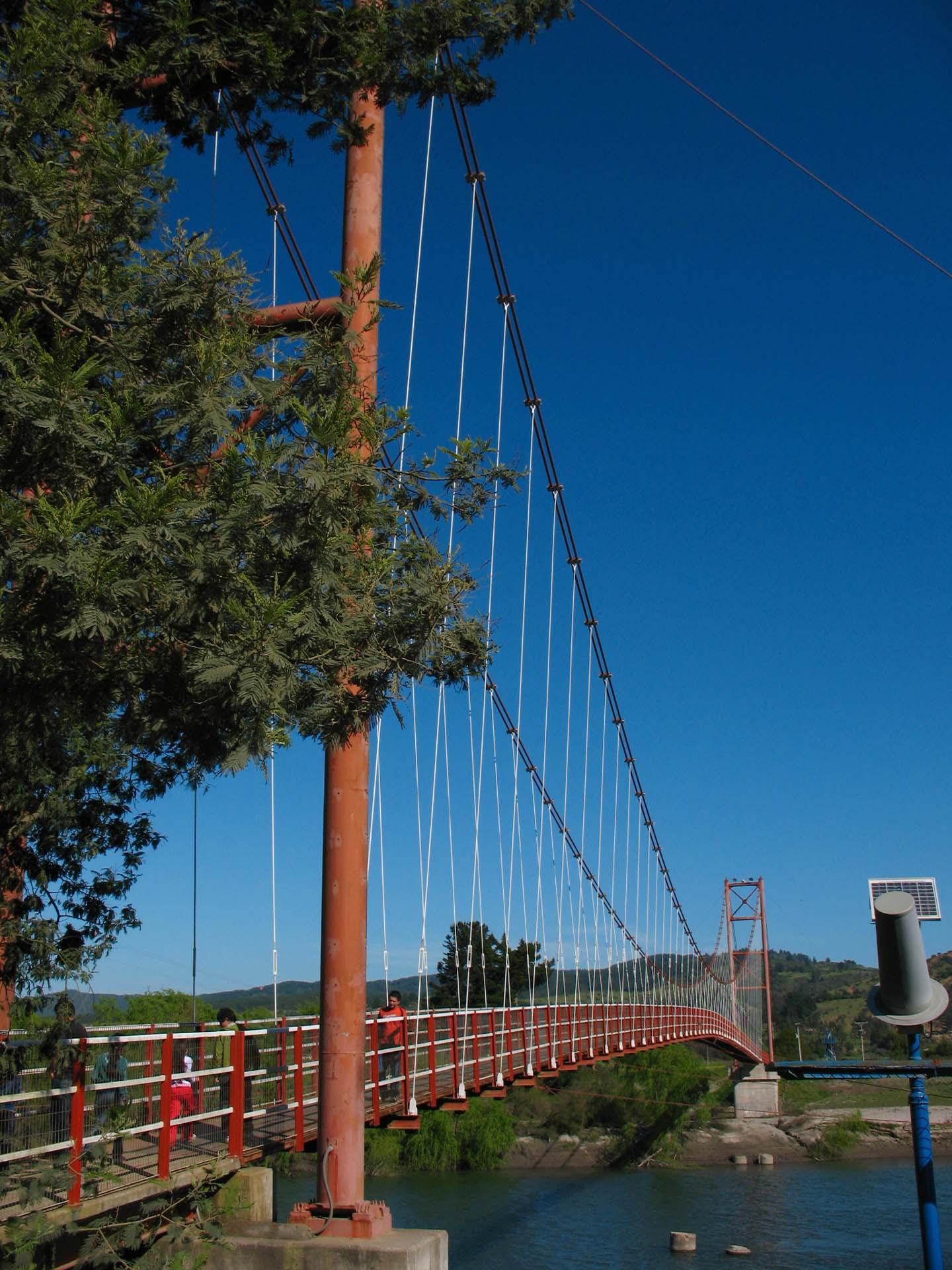 Licanten colgante